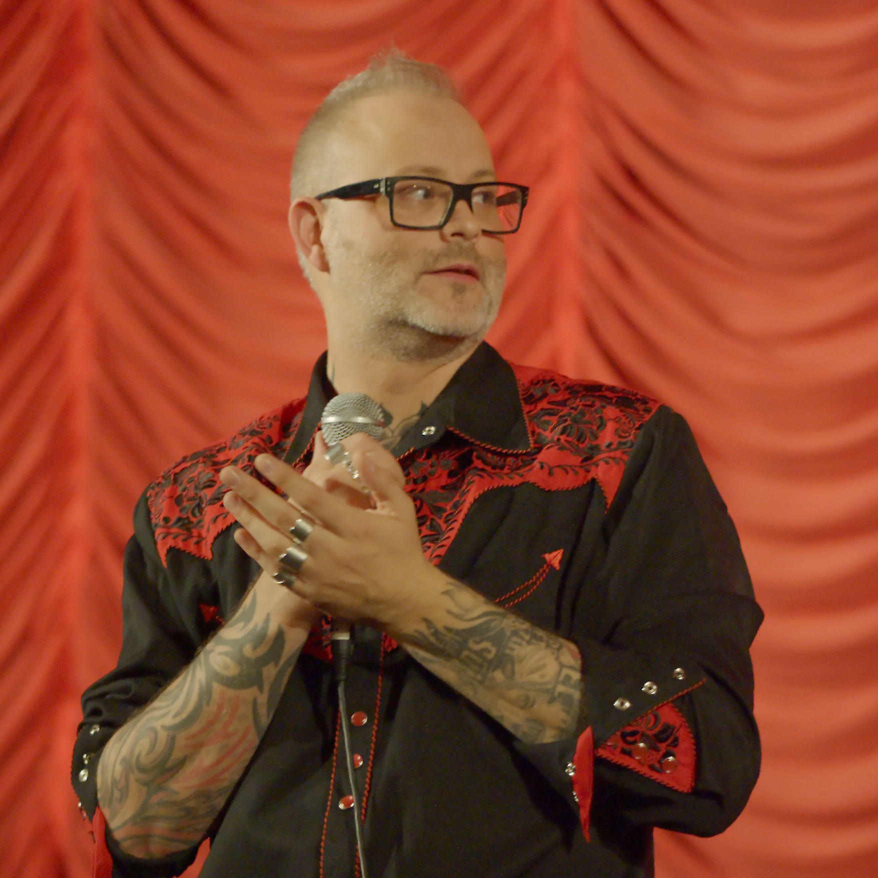 Denis Côté bei der Viennale 2013